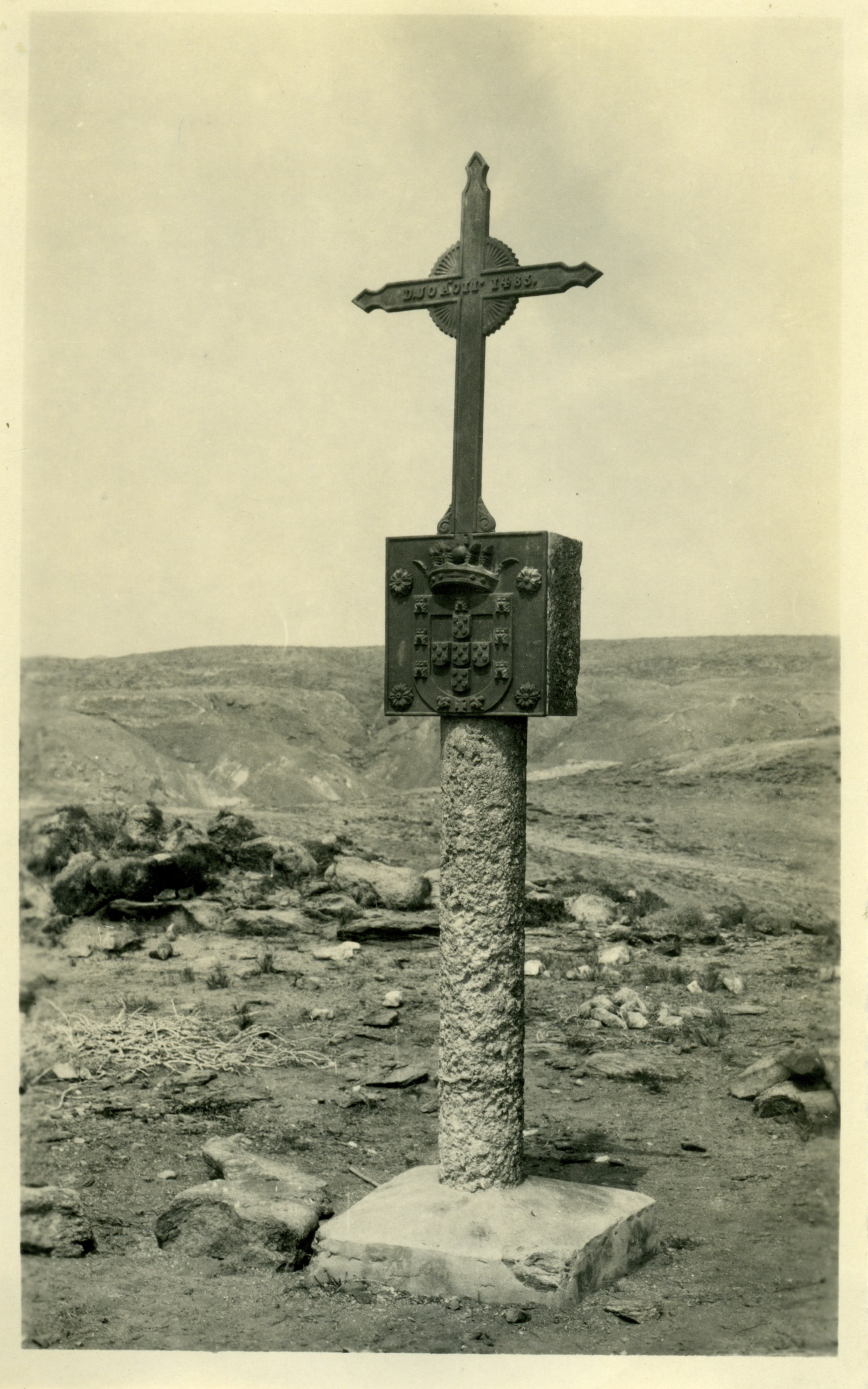 Cette photo faisait partie d'un ensemble déstiné a l"Exposição Colonial Portuguesa" de 1934